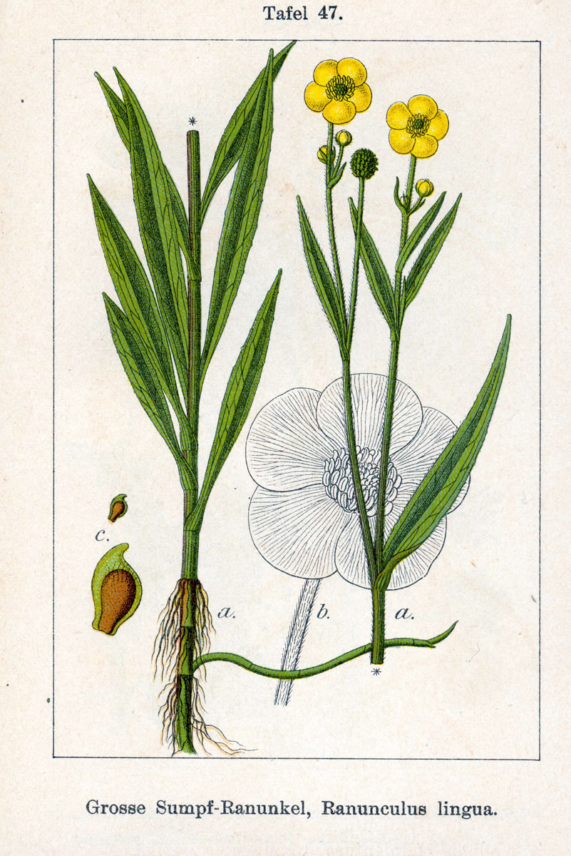 Fig. from book